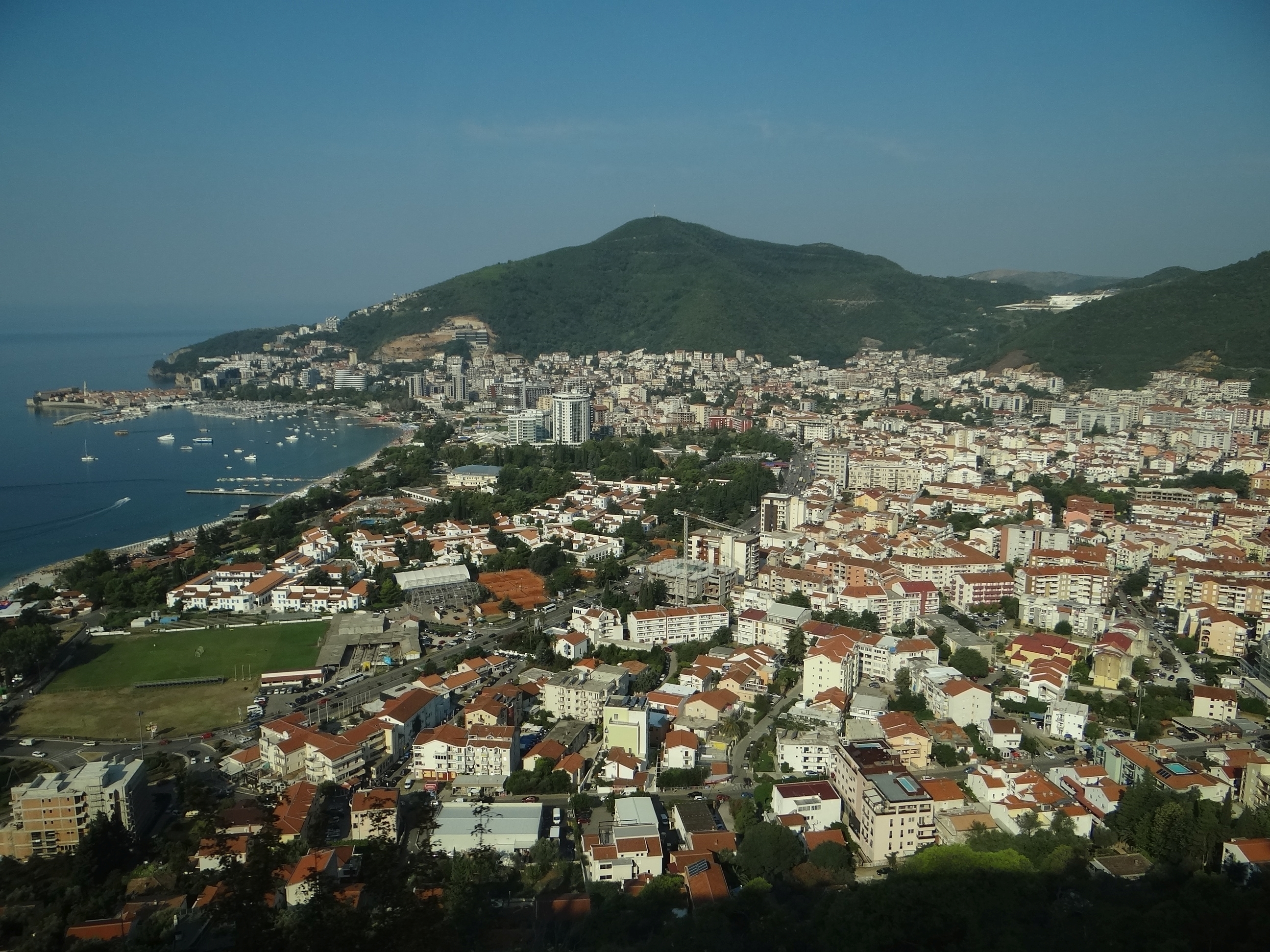 Budva